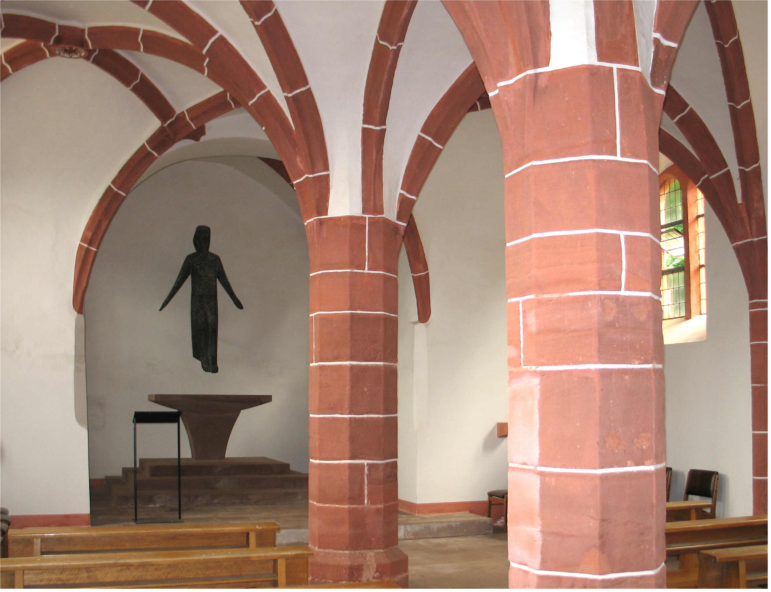 An der aler Kierch vu Kastel-Staadt